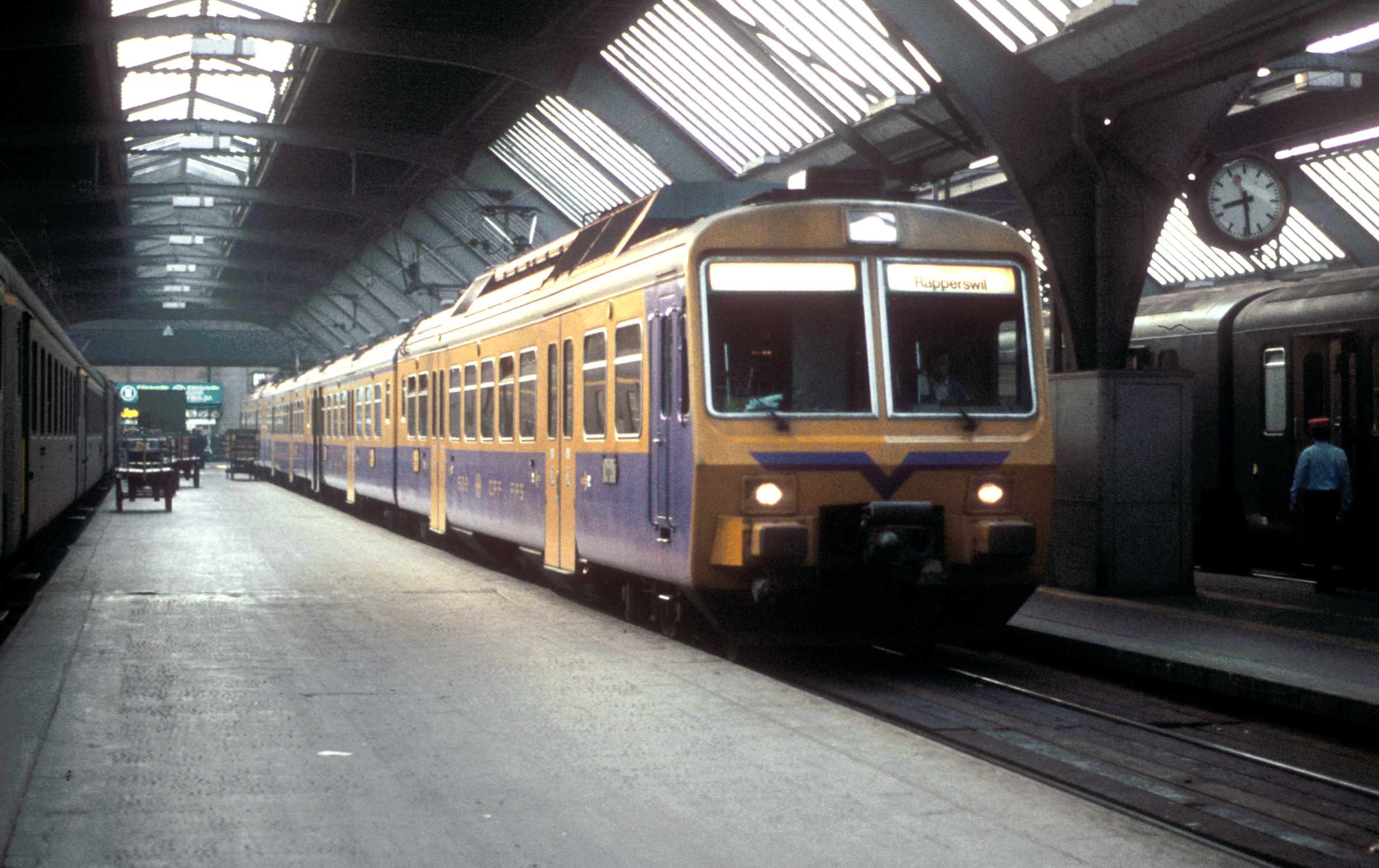 Schweizerische Bundesbahnen (SBB) treinstel van de serie RABDe 8/16 (ook wel Chiquita genoemd) naar Rapperswil in het station Zurich HB. (deze foto is op het bagage perron genomen)